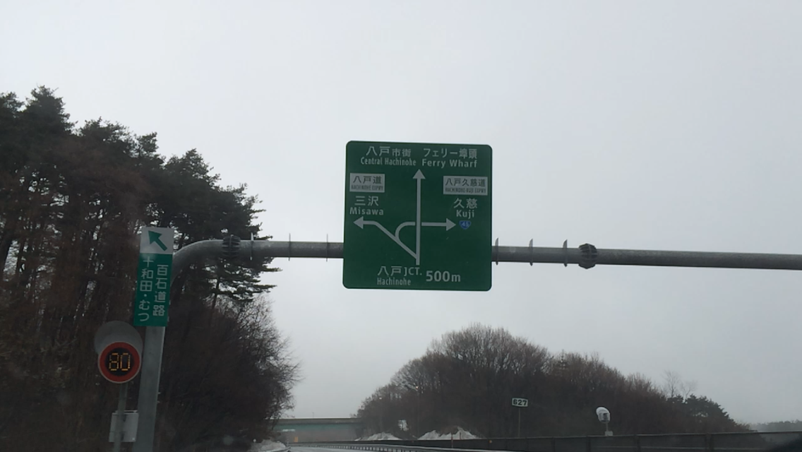 八戸JCT 情報看板